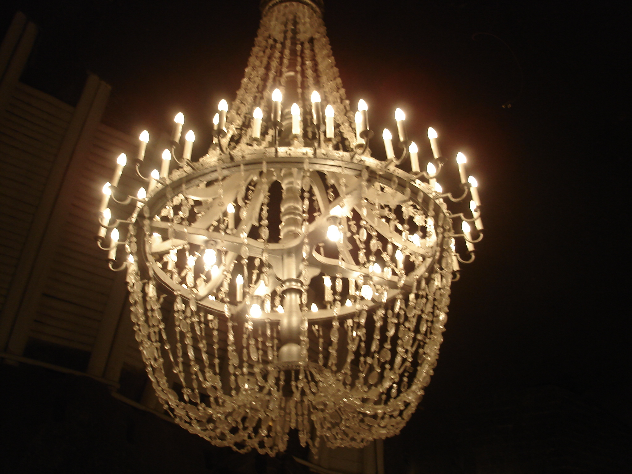 Wieliczka, Poland